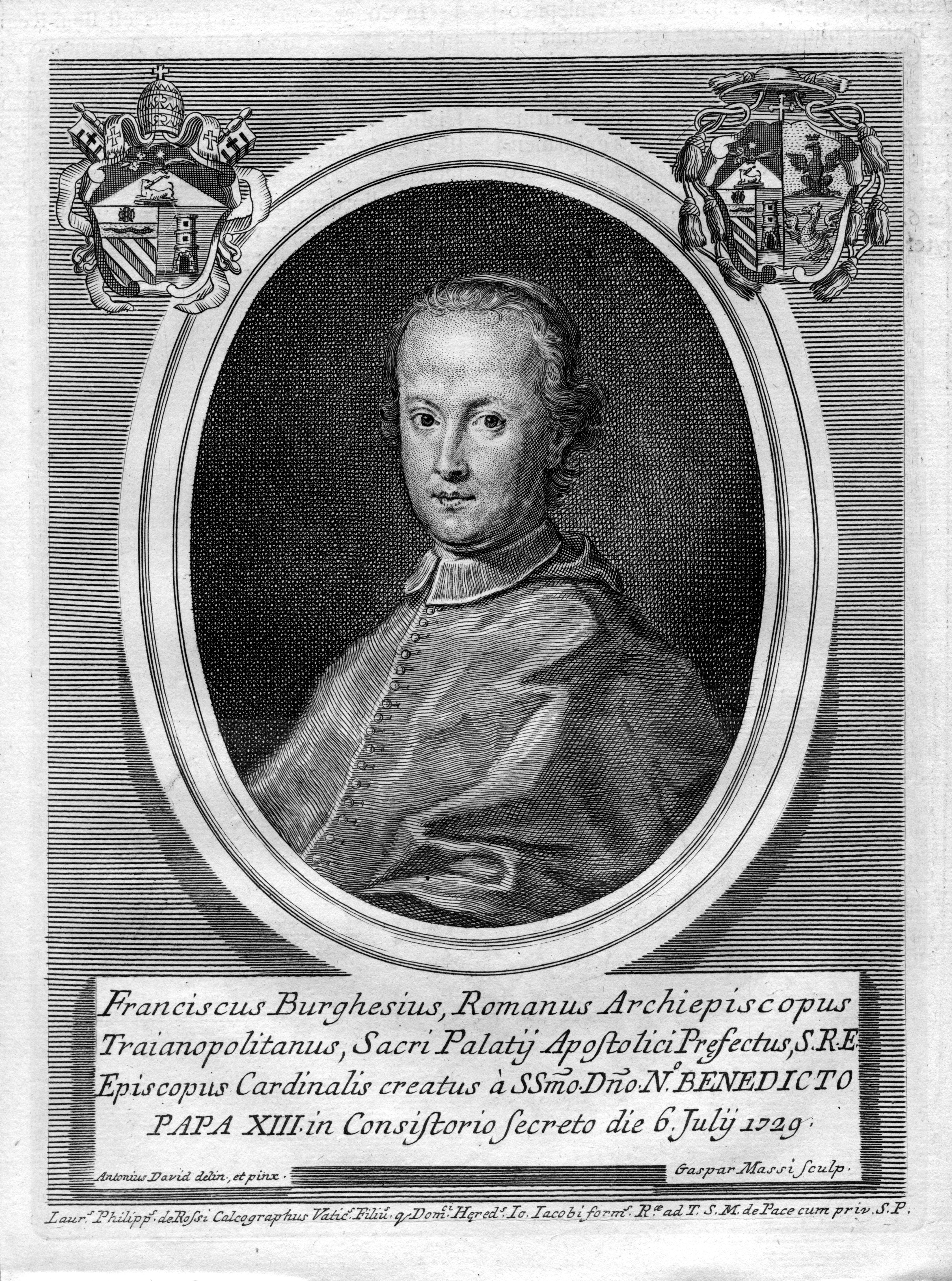 Portrait de Francesco Scipione Maria Borghese (1697-1759)